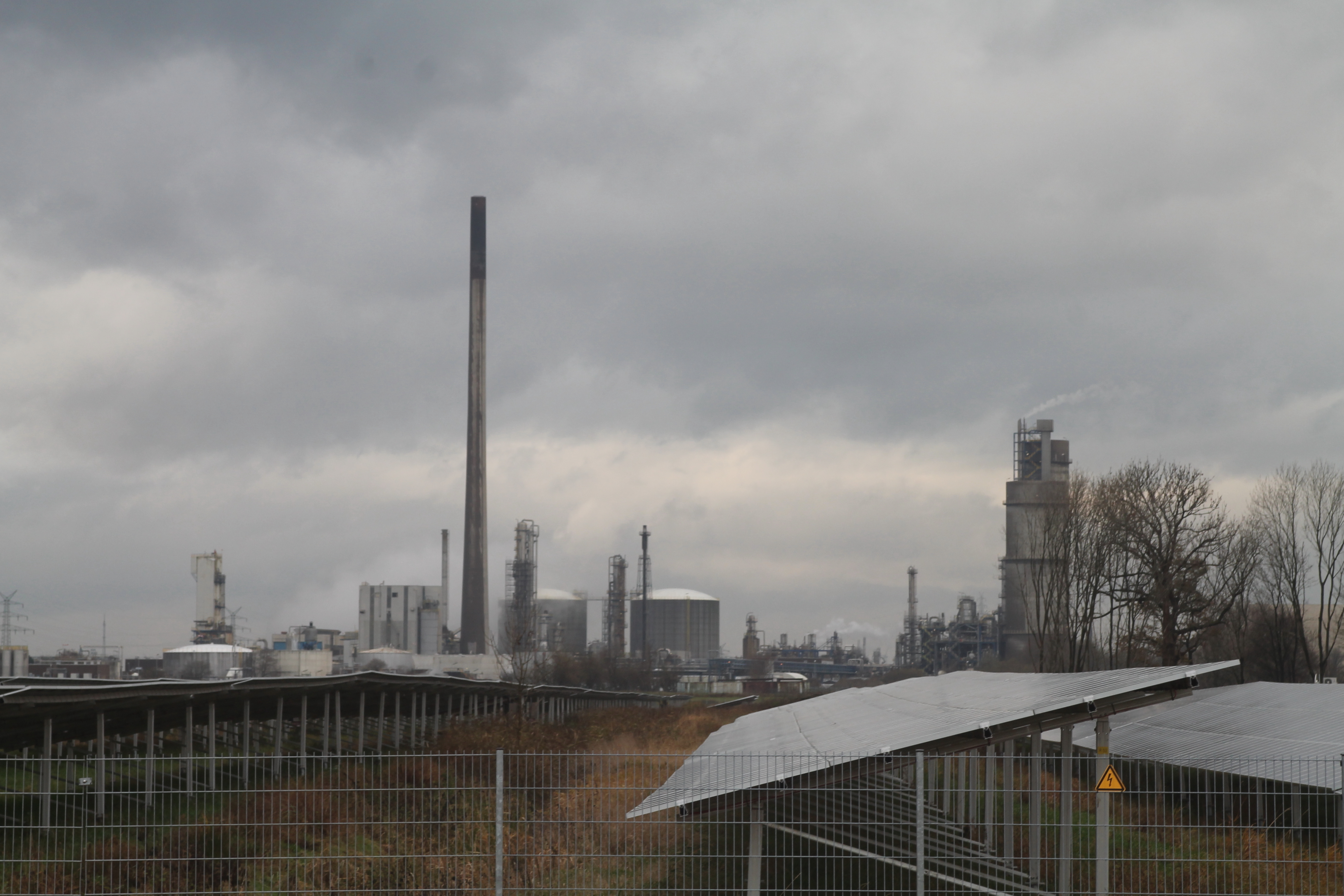 Yarawerk Brunsbüttel